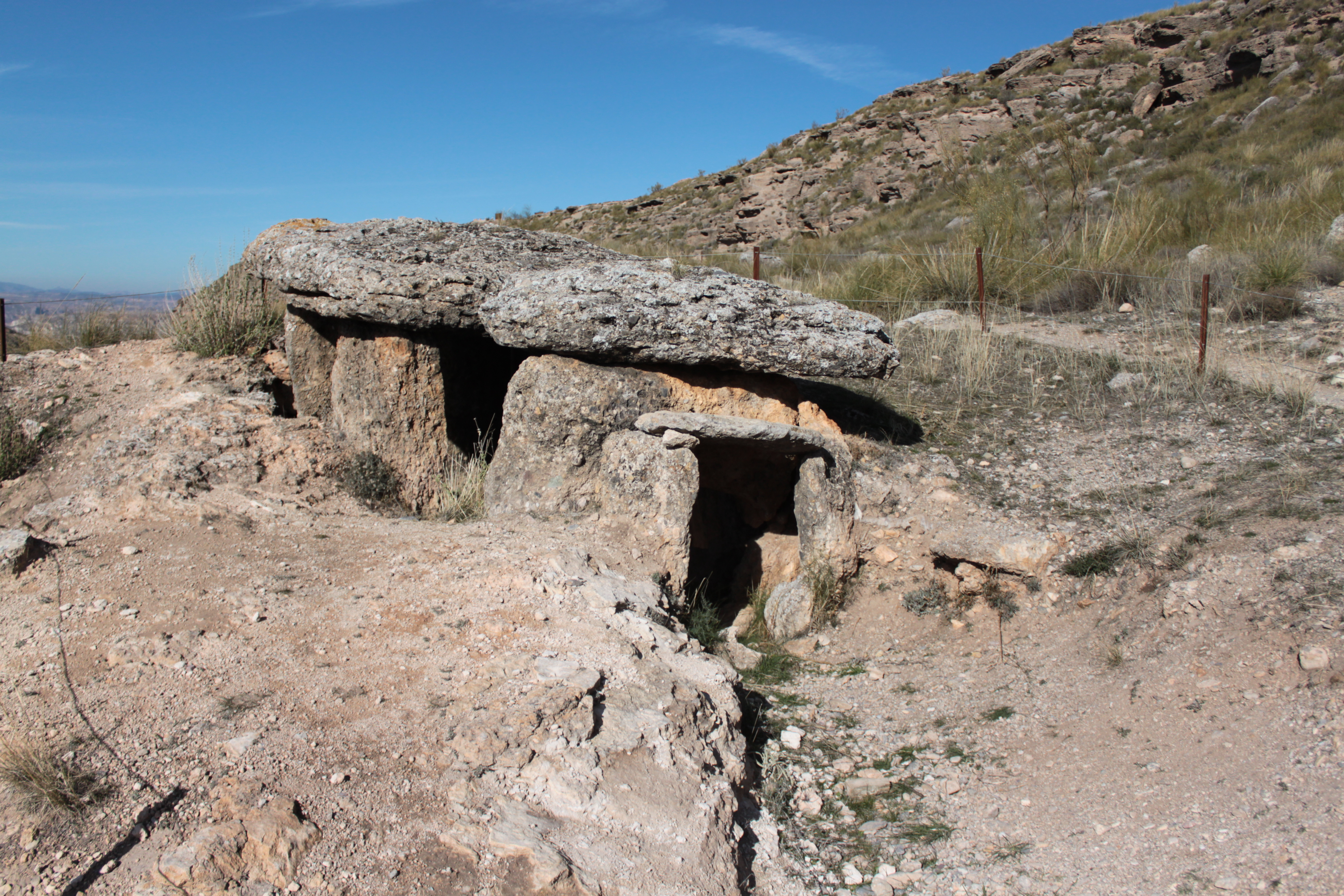 Dolmen 134 del Parque Megalítico de Gorafe situado en la Hoya del Conquil. Gorafe, provincia de Granada, Andalucía, España.